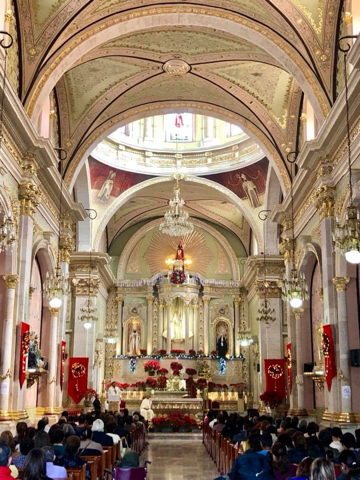 Interior de la Parroquia de San Miguel Arcángel de Uriangato, Gto., en la misa de Navidad.